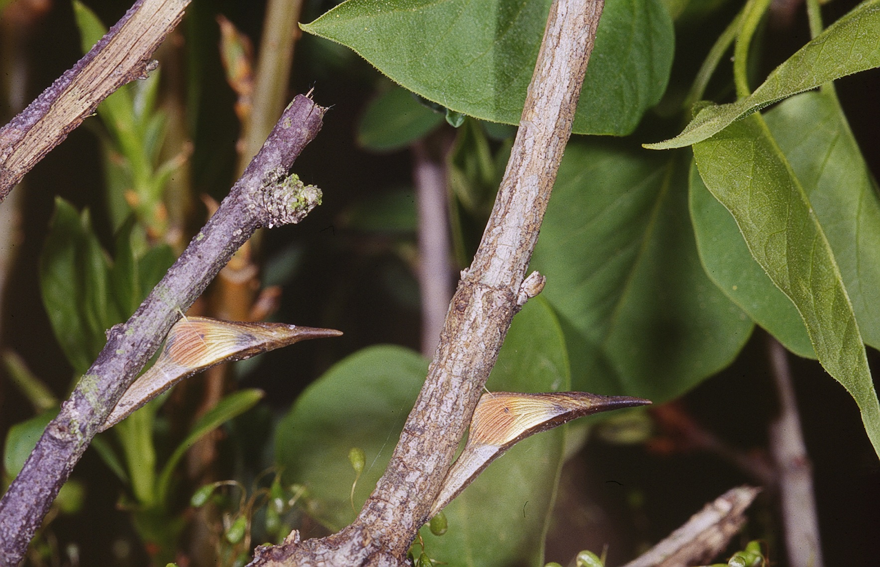 Deux chrysalides de l'AURORE avec perception des couleurs de l'imago mâle au travers de la paroi. Je suis le photographe et le propriétaire de ce cliché (diapositives) réalisé en 1998_ 6ème d'une suite de photos montrant la progression de la transformation jusqu'à l'émergence. Clichés réalisés en cages d'élevage permettant le suivi de ces événements.